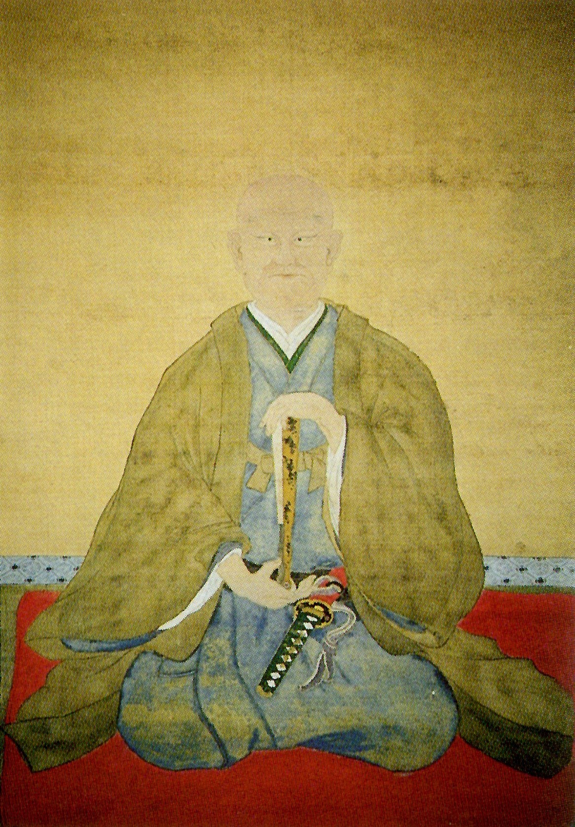 多久茂孝の肖像。